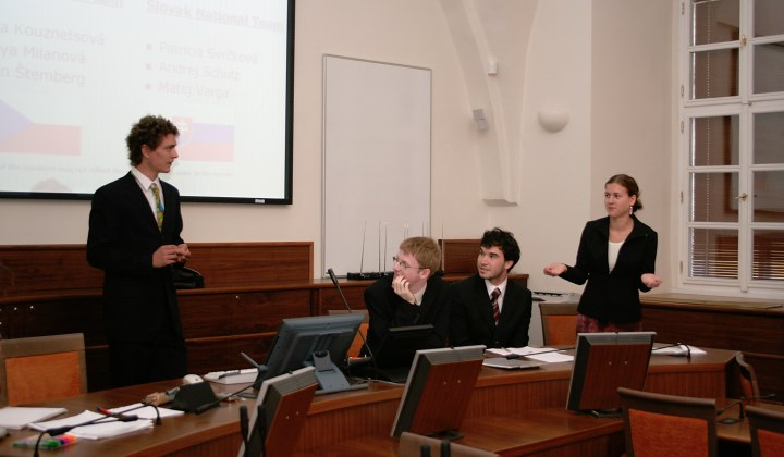 Soutěžní debata. foto: che